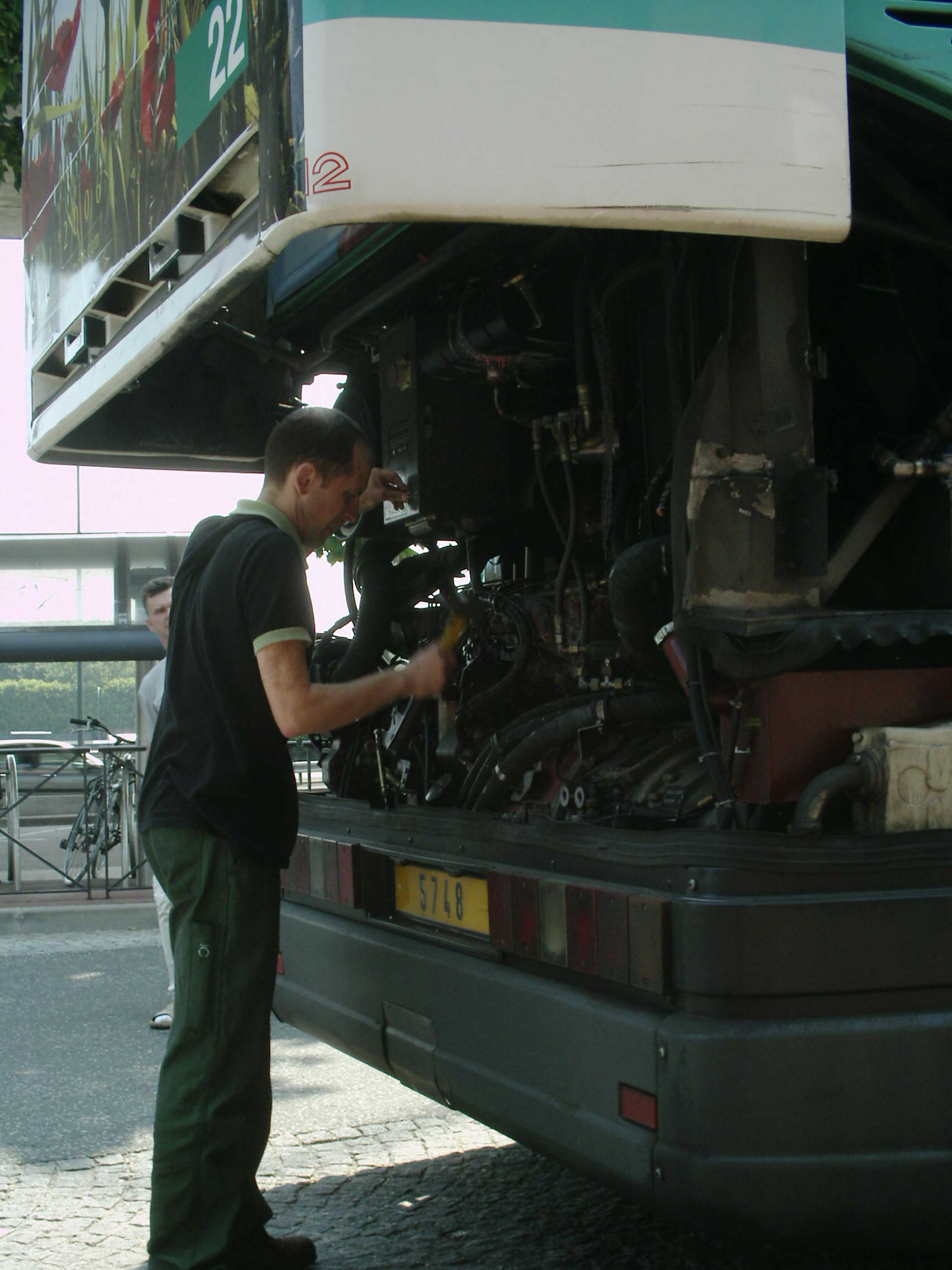 Un employé de la RATP intervient sur le moteur d'un bus de la ligne 22.